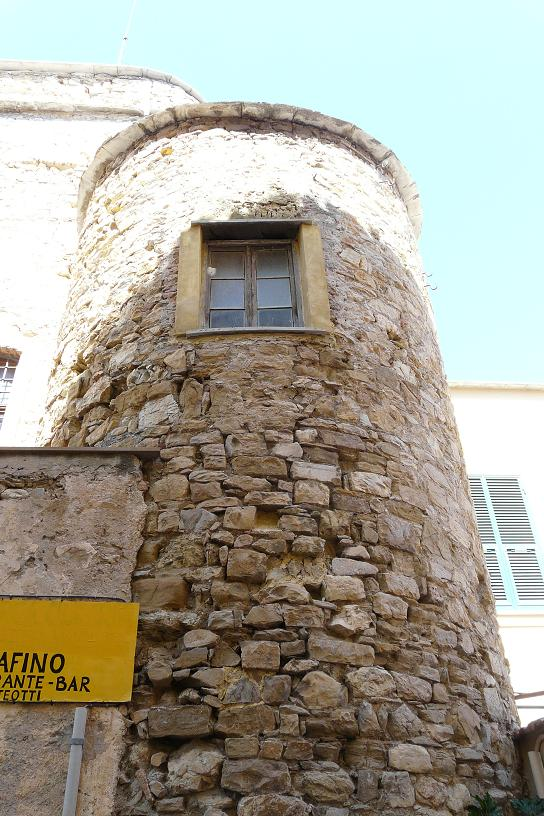 Castello di Cervo (IM), Liguria, Italia